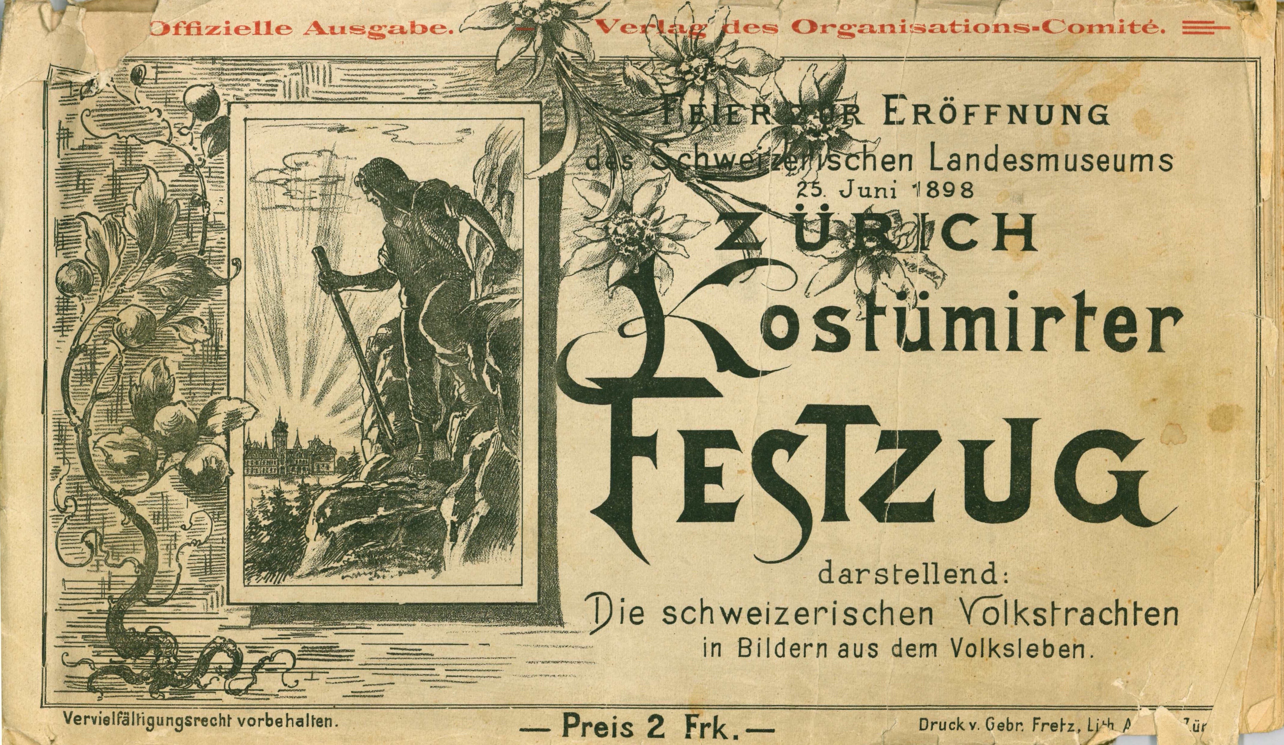 Einweihung Schweizerisches Landesmuseum in Zürich